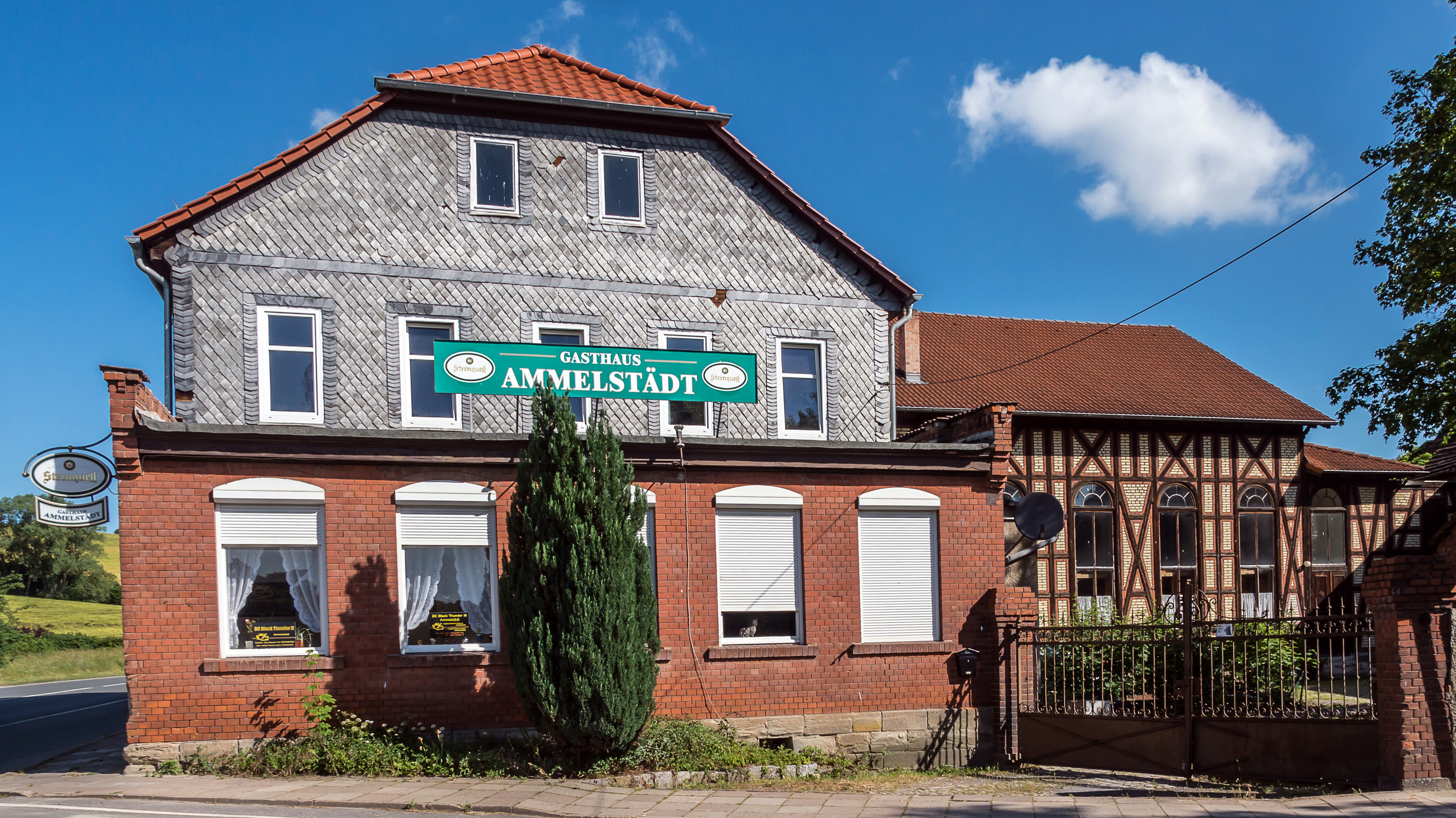 Denkmalgeschützte Gaststätte in Ammelstädt 1,Gemeinde Remda-Teichel